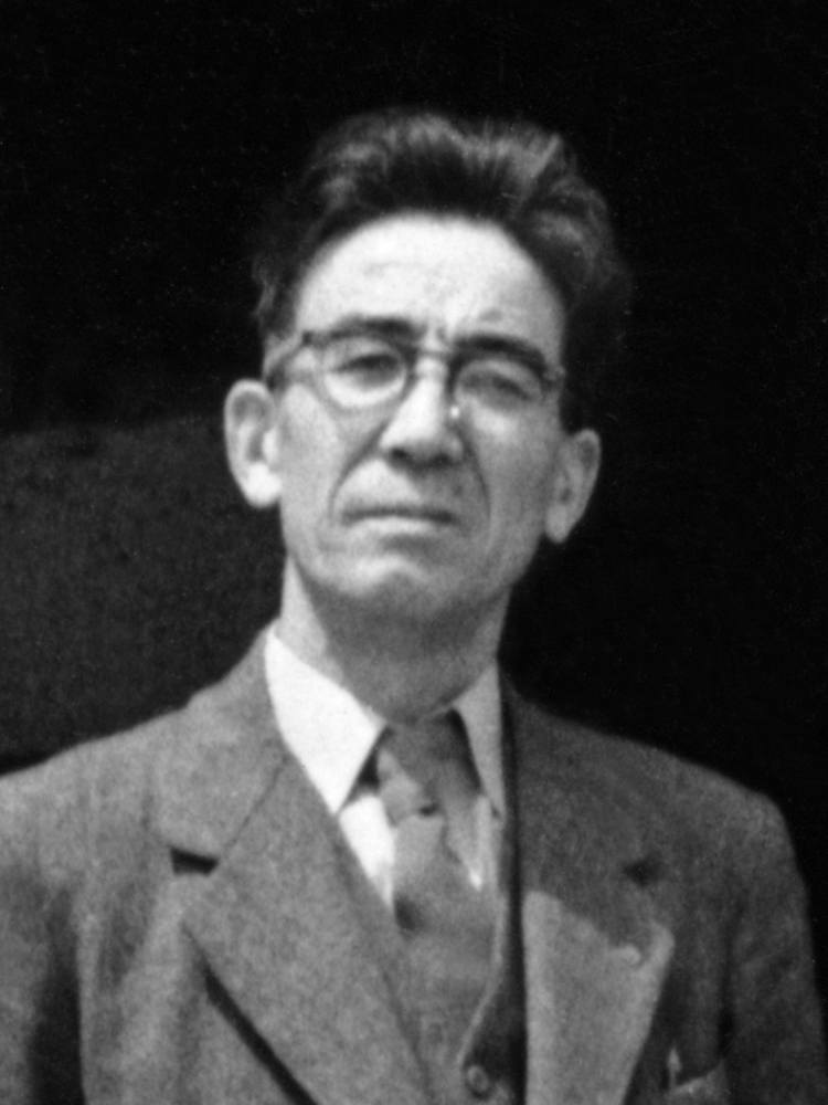 佐藤秀三のスナップ写真です。